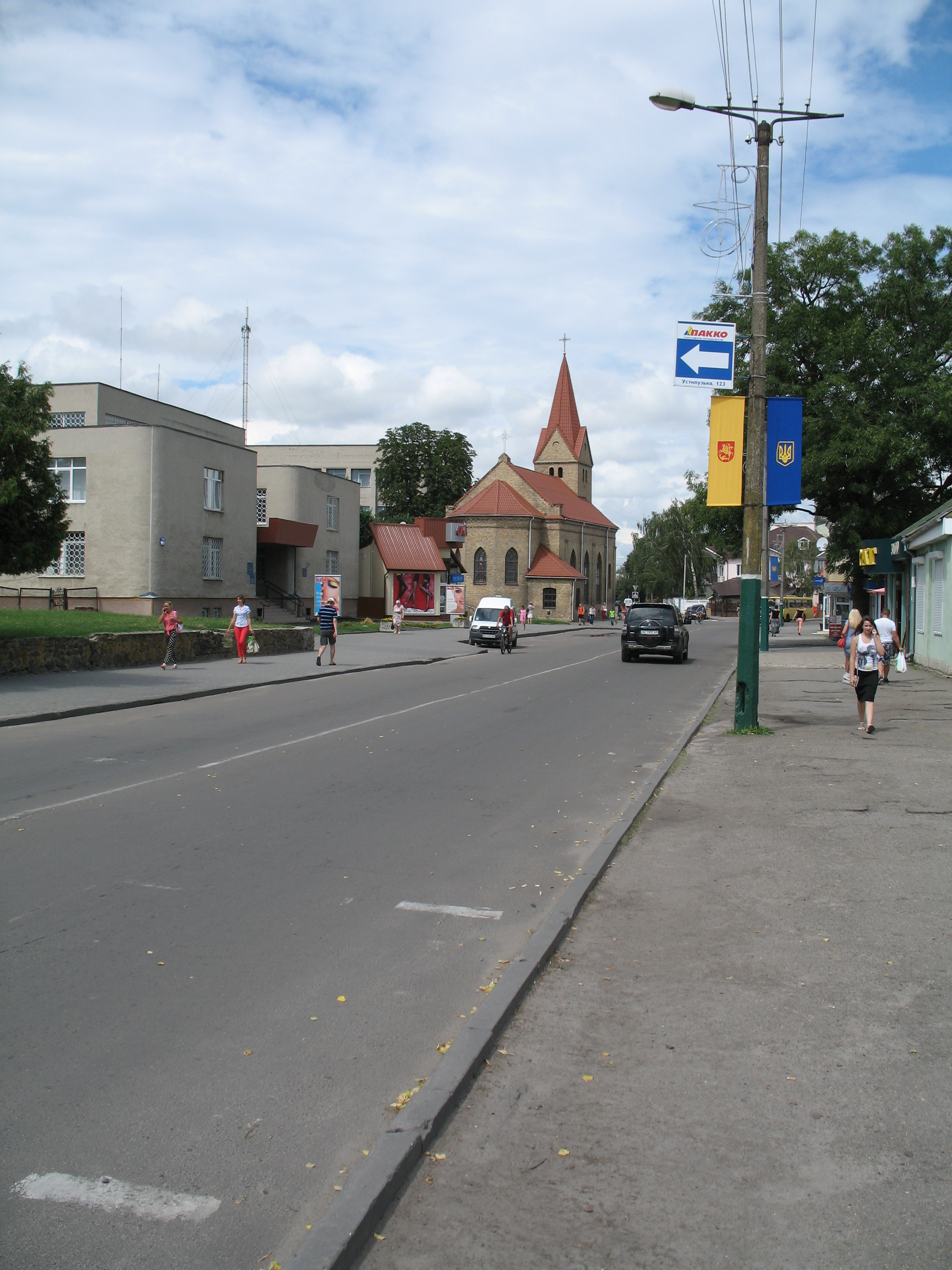 Кірха